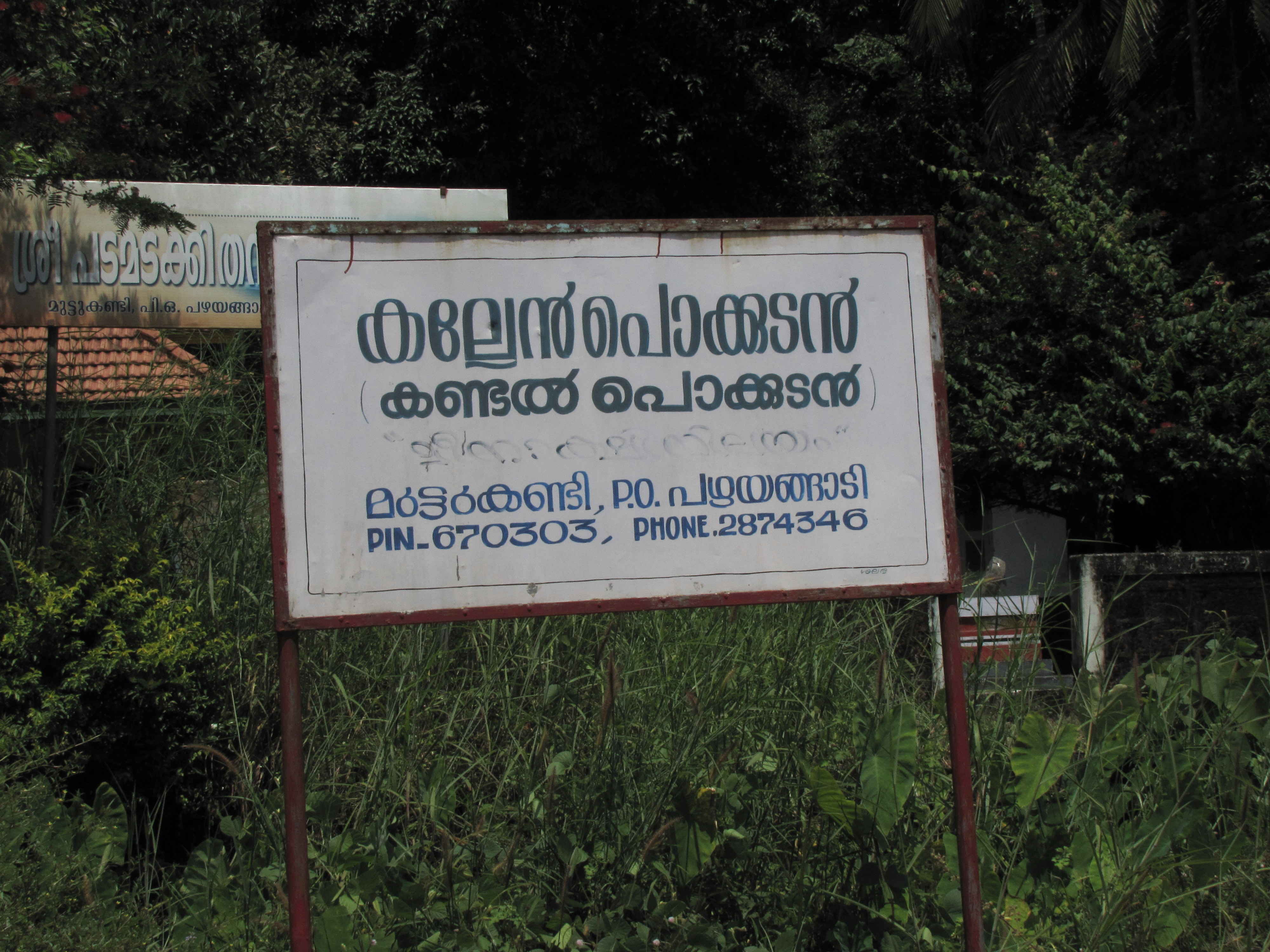 Kallen Pokkutan's Address in Malayalam near his house